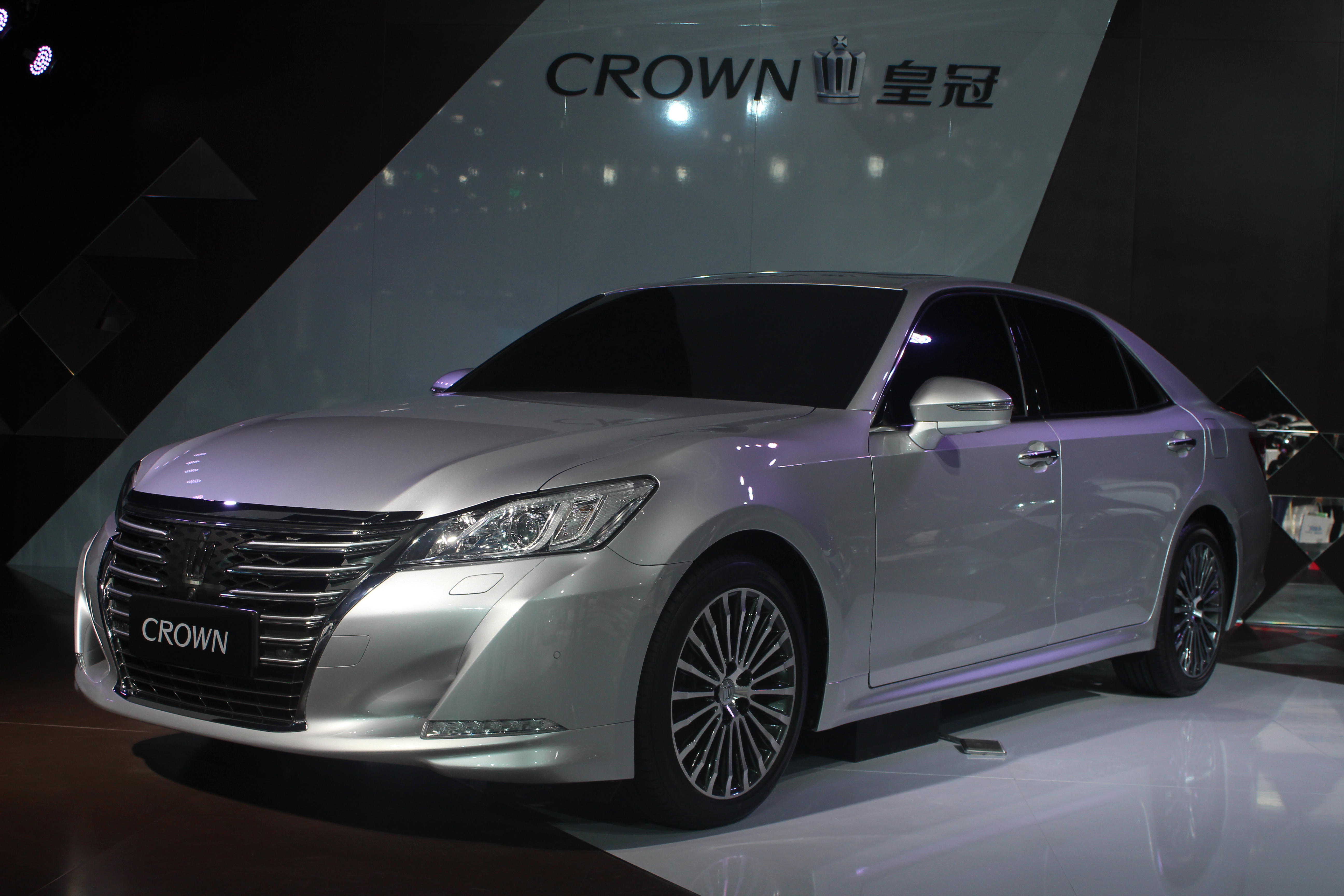 一汽丰田S210皇冠中国样式车于2014年广州车展